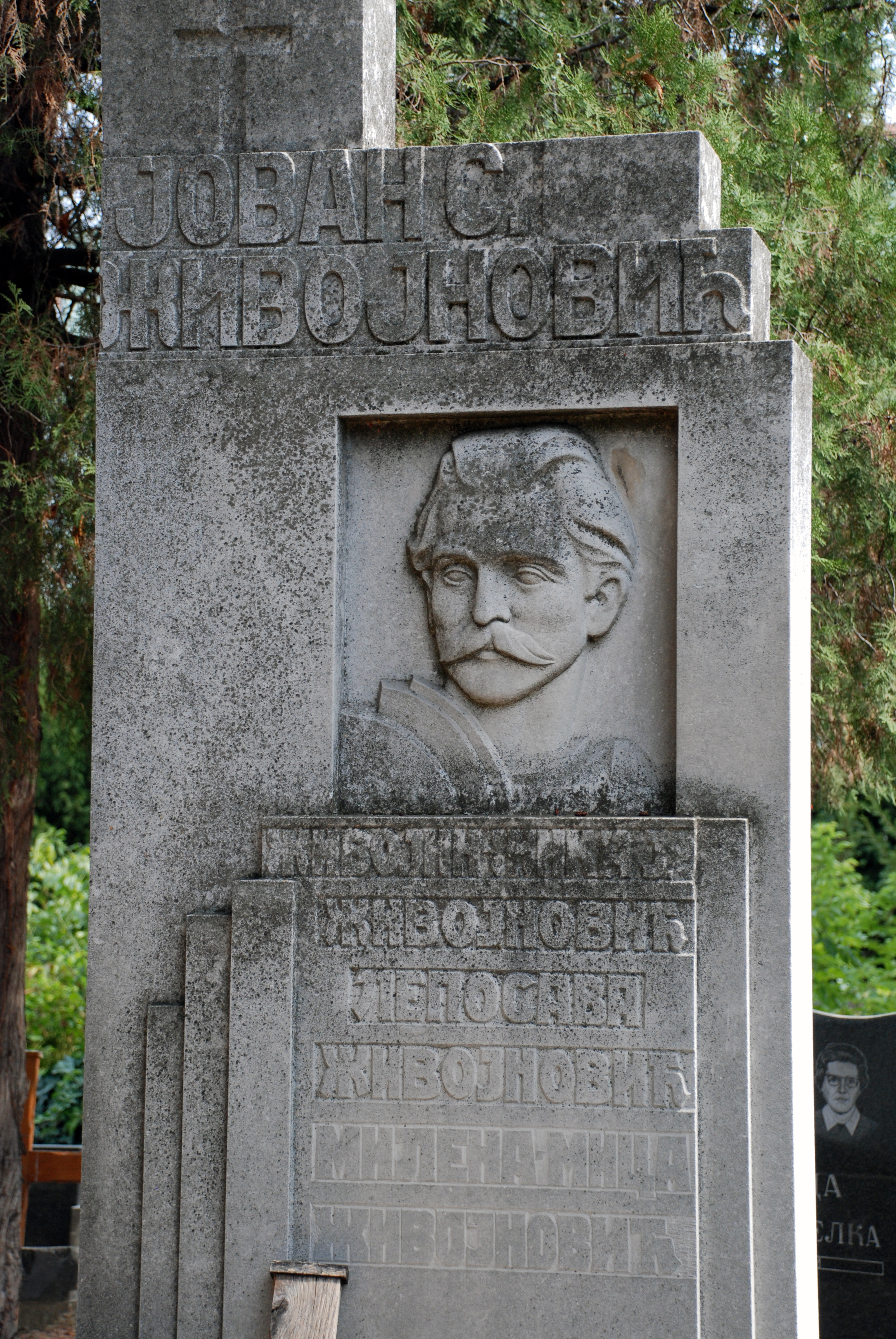 1870-1927, професор, писац и први градоначелник у Новом Саду после уједињења 1918. године, директор новосадске гимназије, писац уџбеника, песама и драмских састава.